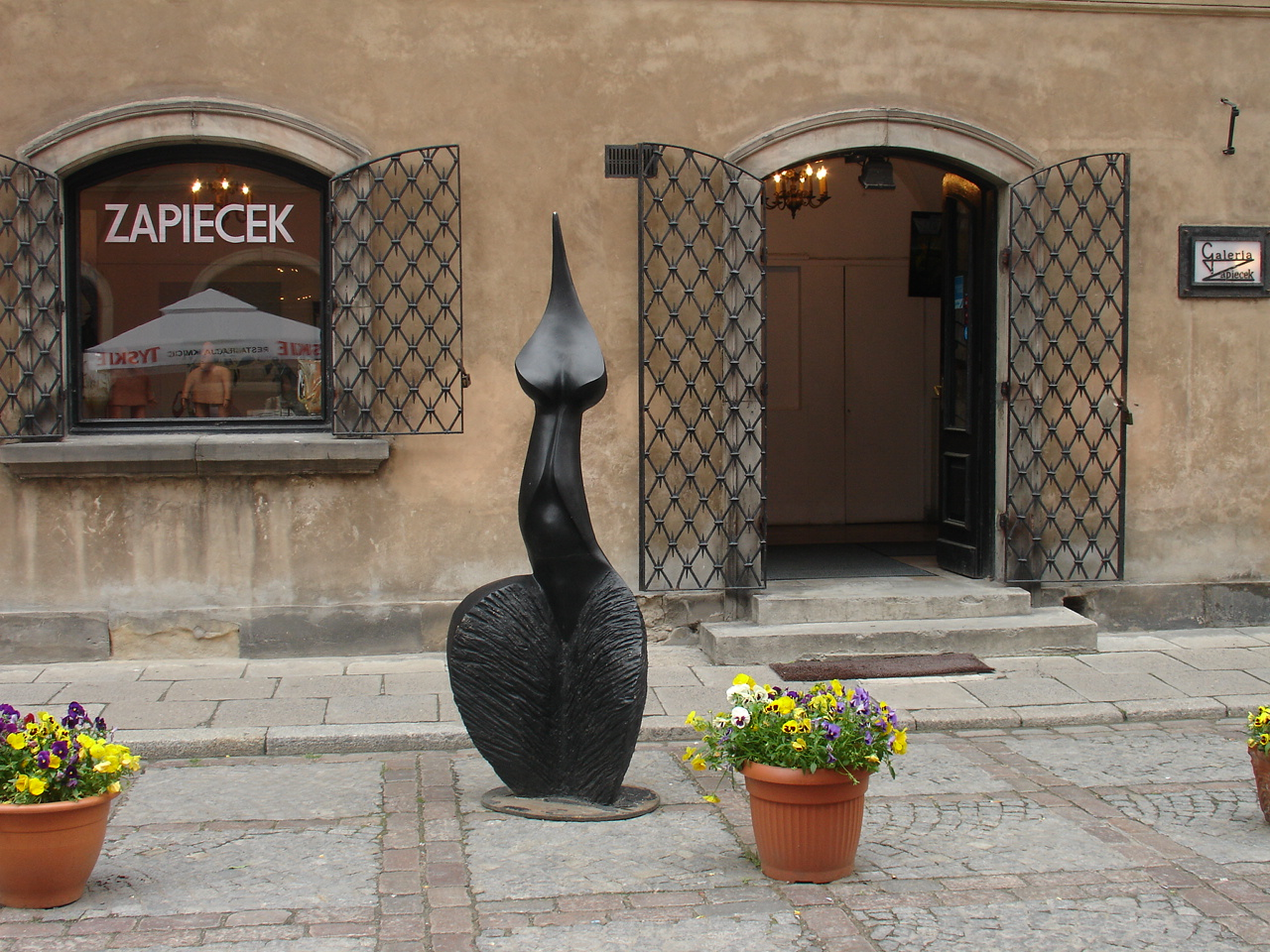 Główne wejście do Galerii Zapiecek w Warszawie na Starym Mieście